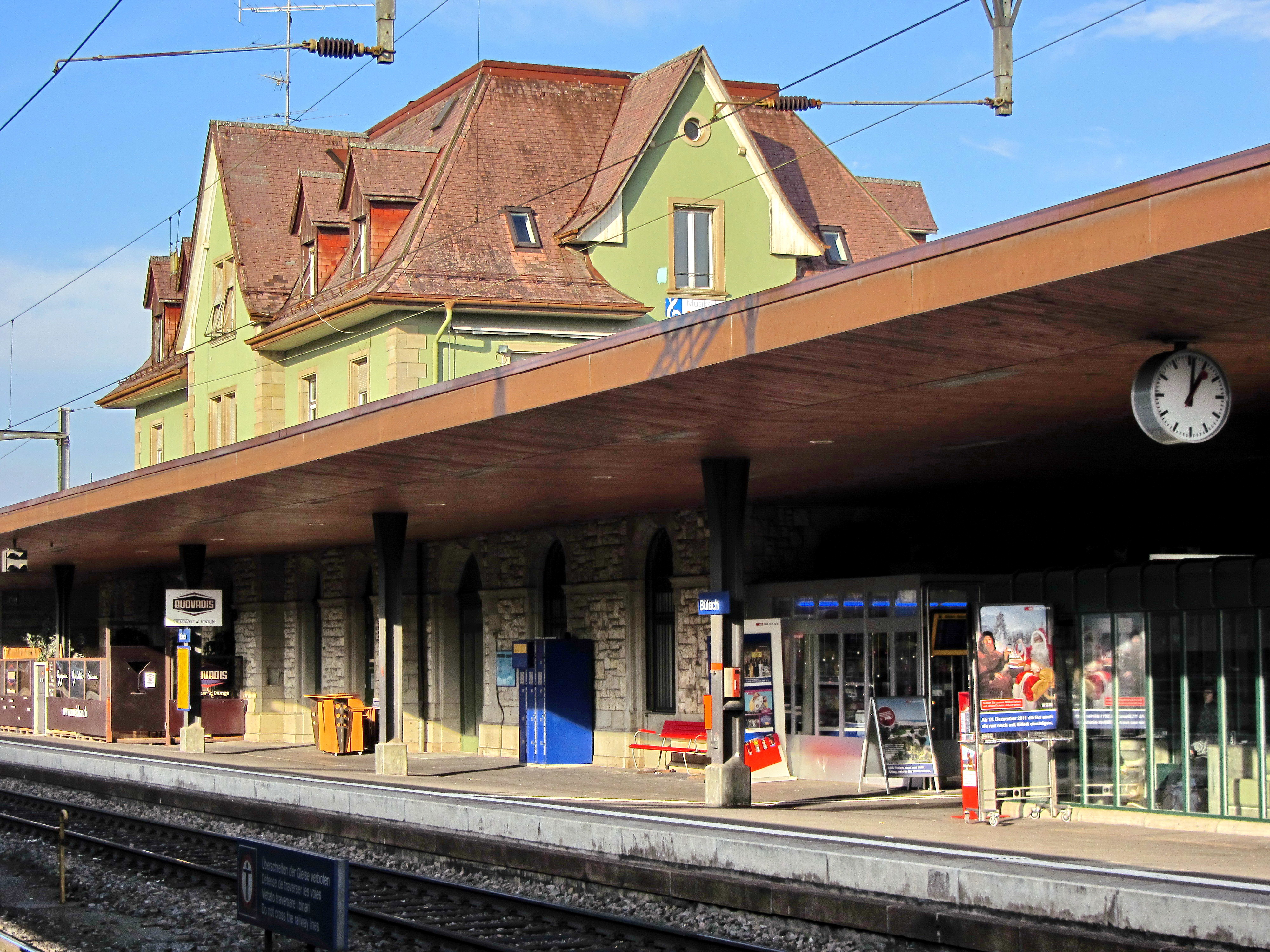 Bahnhof in Bülach (Switzerland)